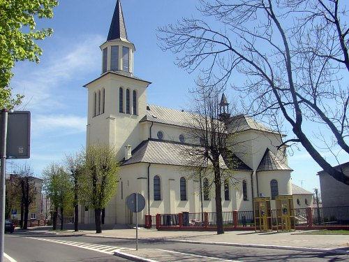 Kosciol farny w Hajnowce